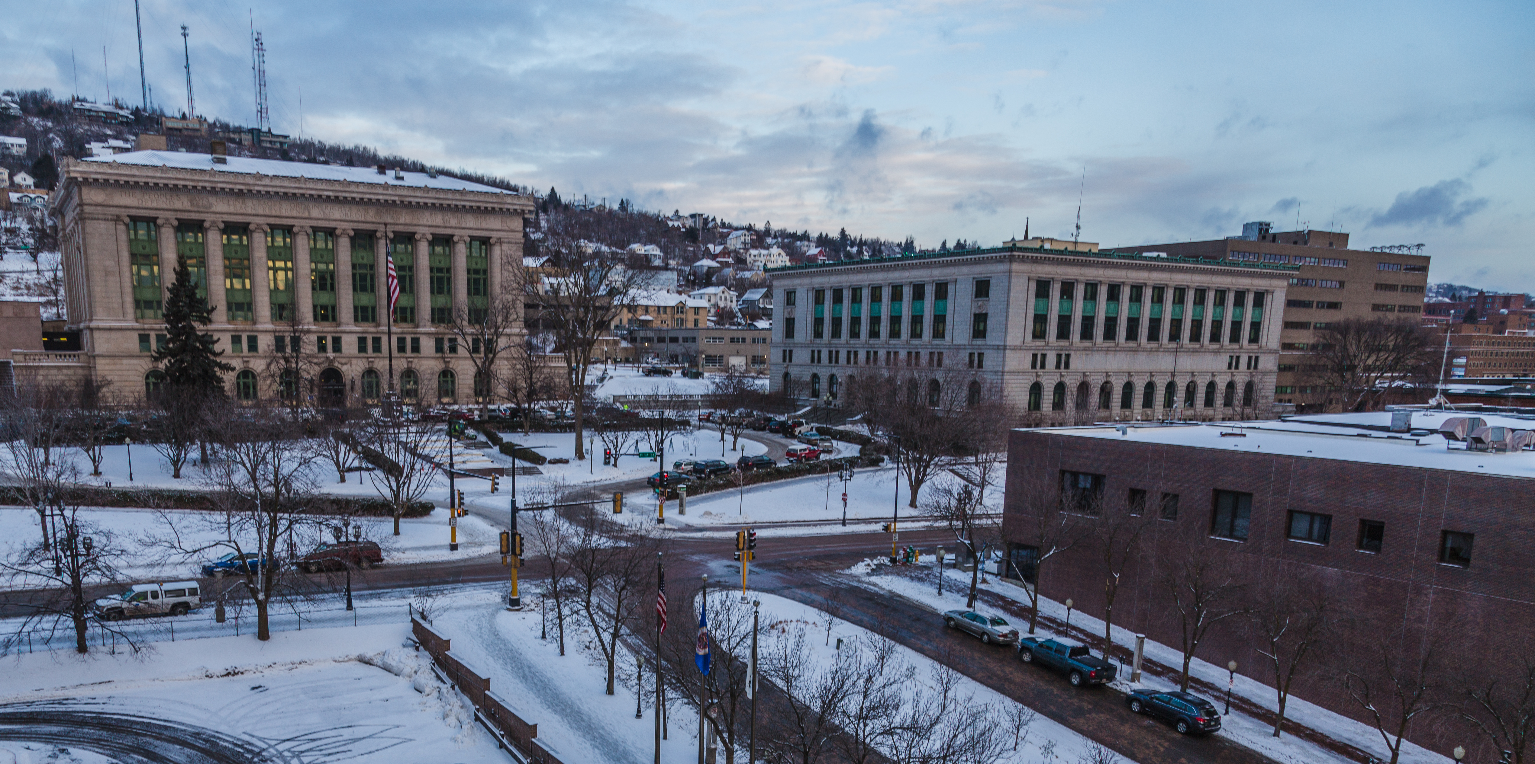 Duluth, Minnesota